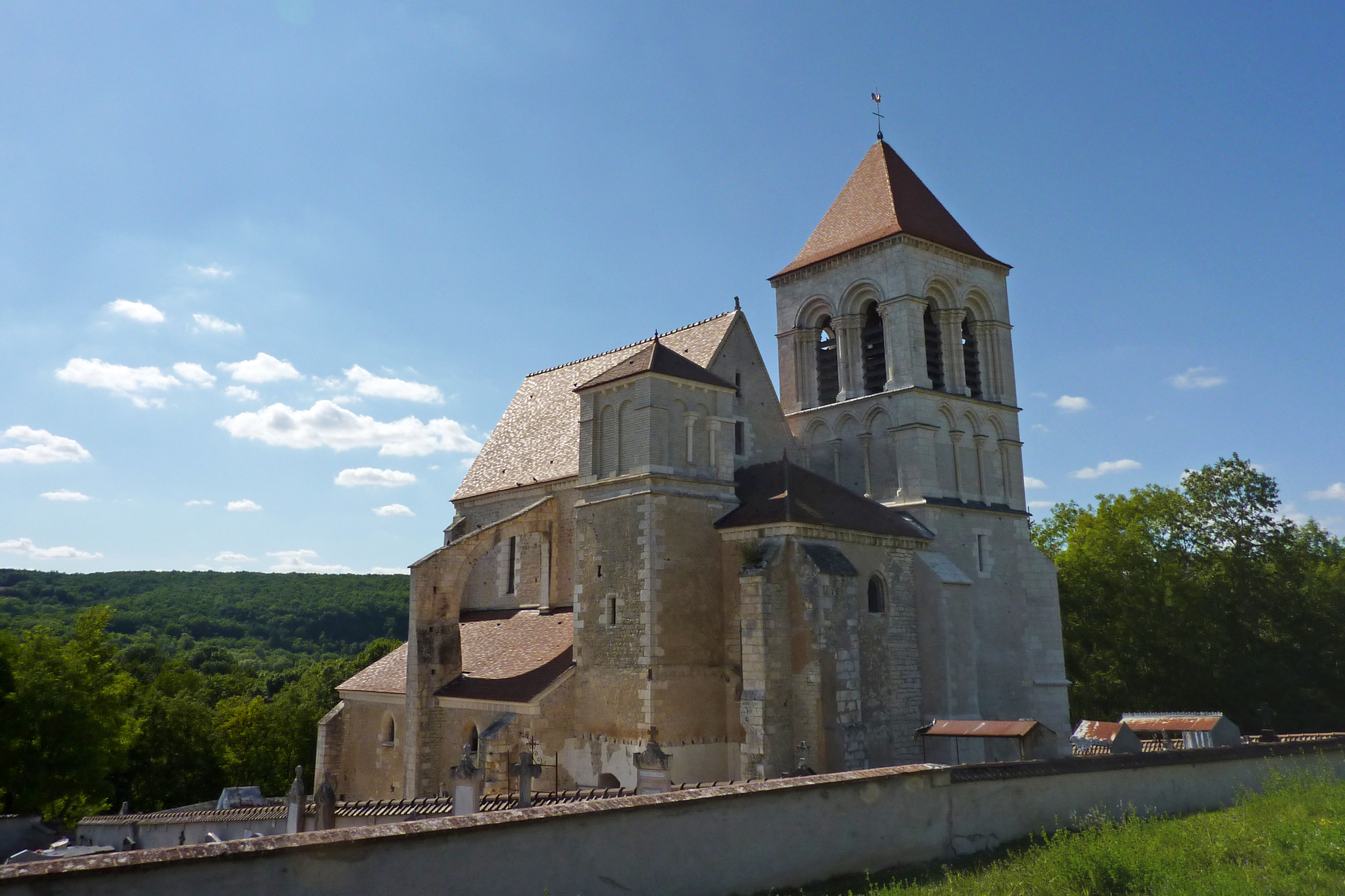 L'église Notre-Dame de Prégilbert (Yonne)